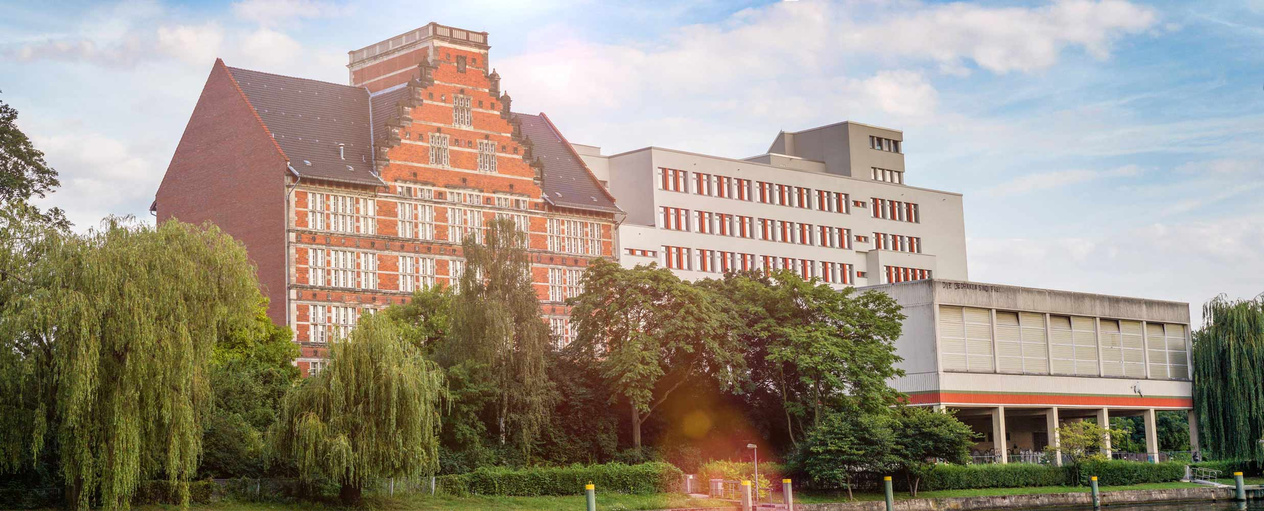 Dieses Foto zeigt das Gymnasium Tiergarten vom Spreeufer aus.